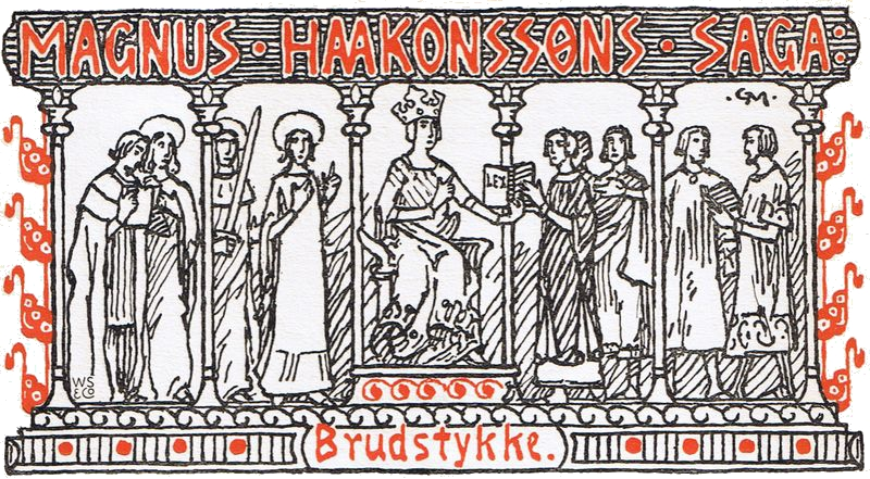 Illustrasjon Magnus Lagabøtes saga